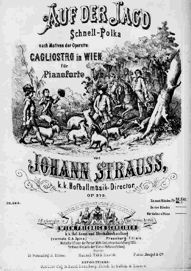 == Licenza d'uso: ==